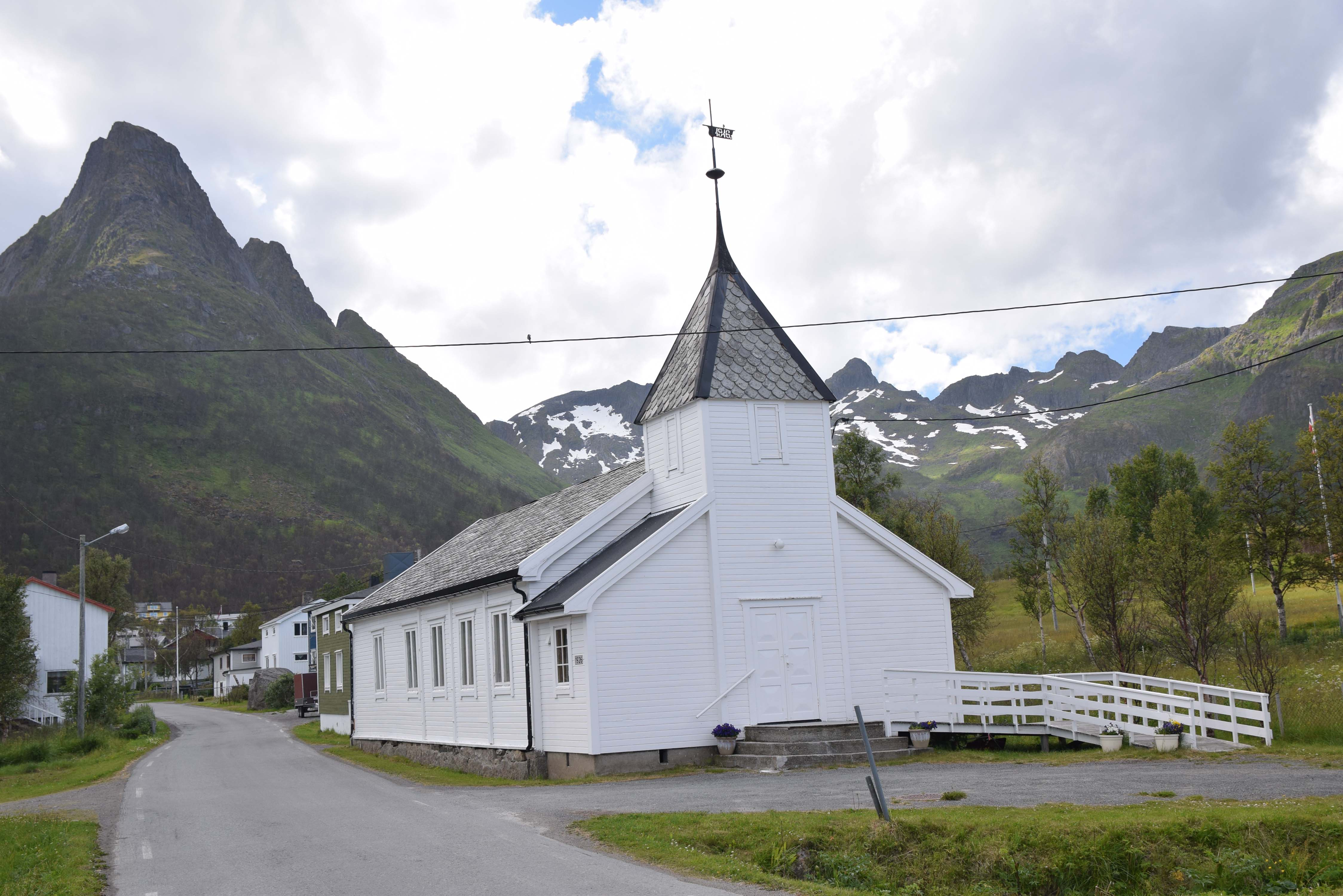 Mefjordvær kapell, Senja